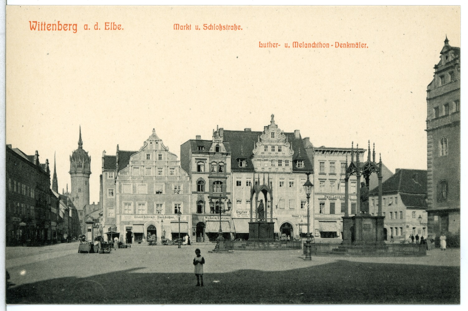 Wittenberg; Markt mit den Denkmälern Luthers und Melanchthons This postcard is from publisher Brück & Sohn in Meißen ( postcard has a unique number 12845 and is available in a higher resolution at the publisher. This images was uploaded in a cooperation project between Wikipedians and the publisher.